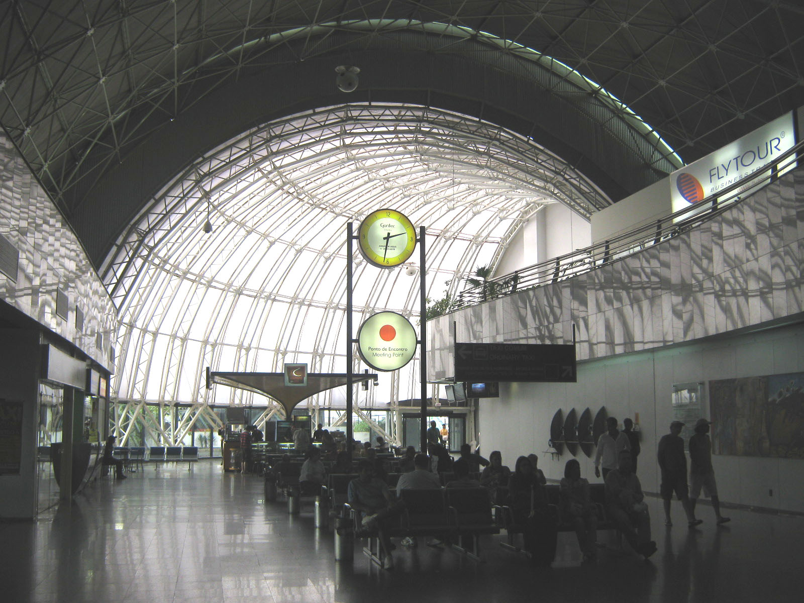 Fortaleza Int'l Airport (FOR)